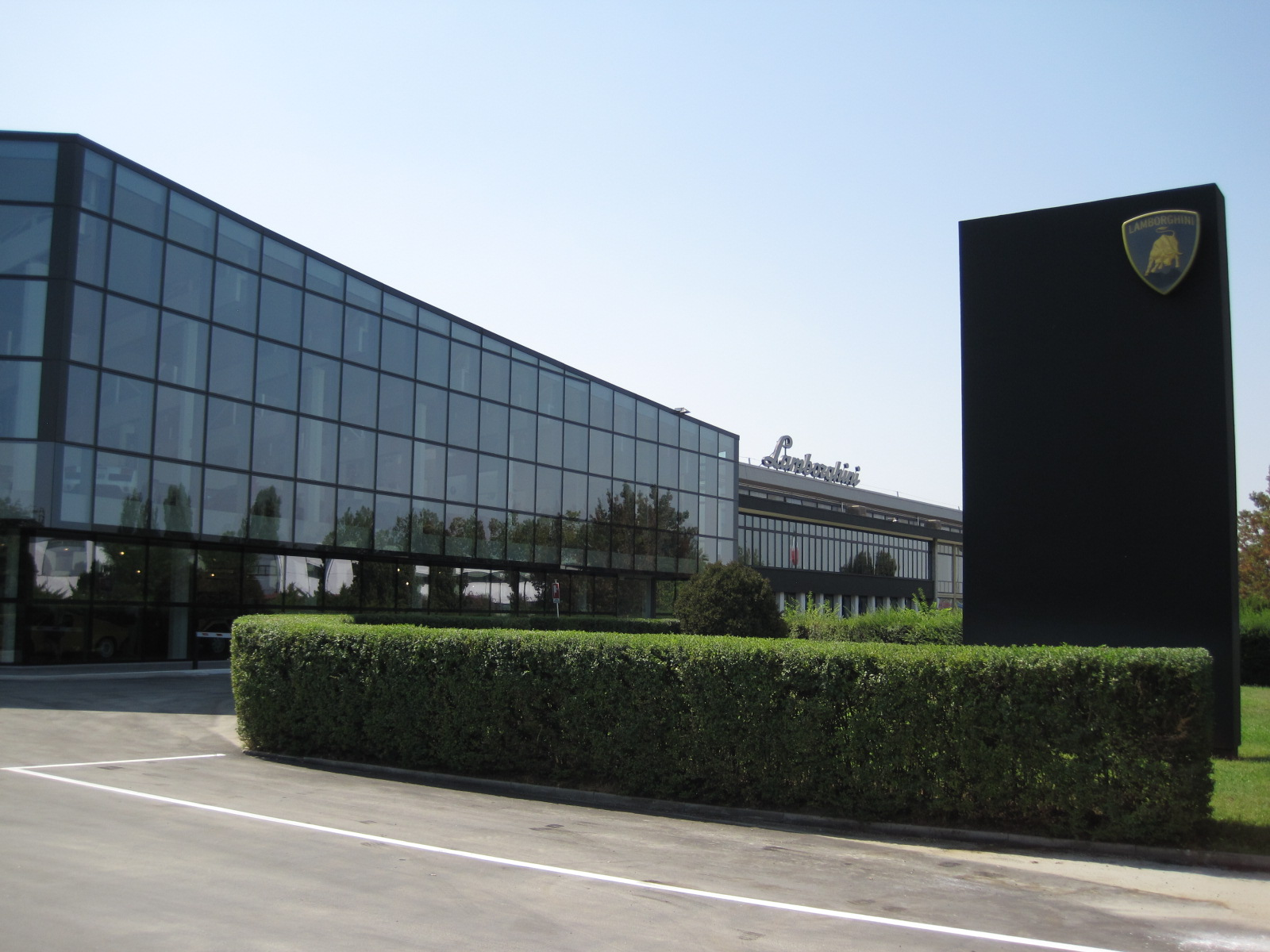 Musée Lamborghini